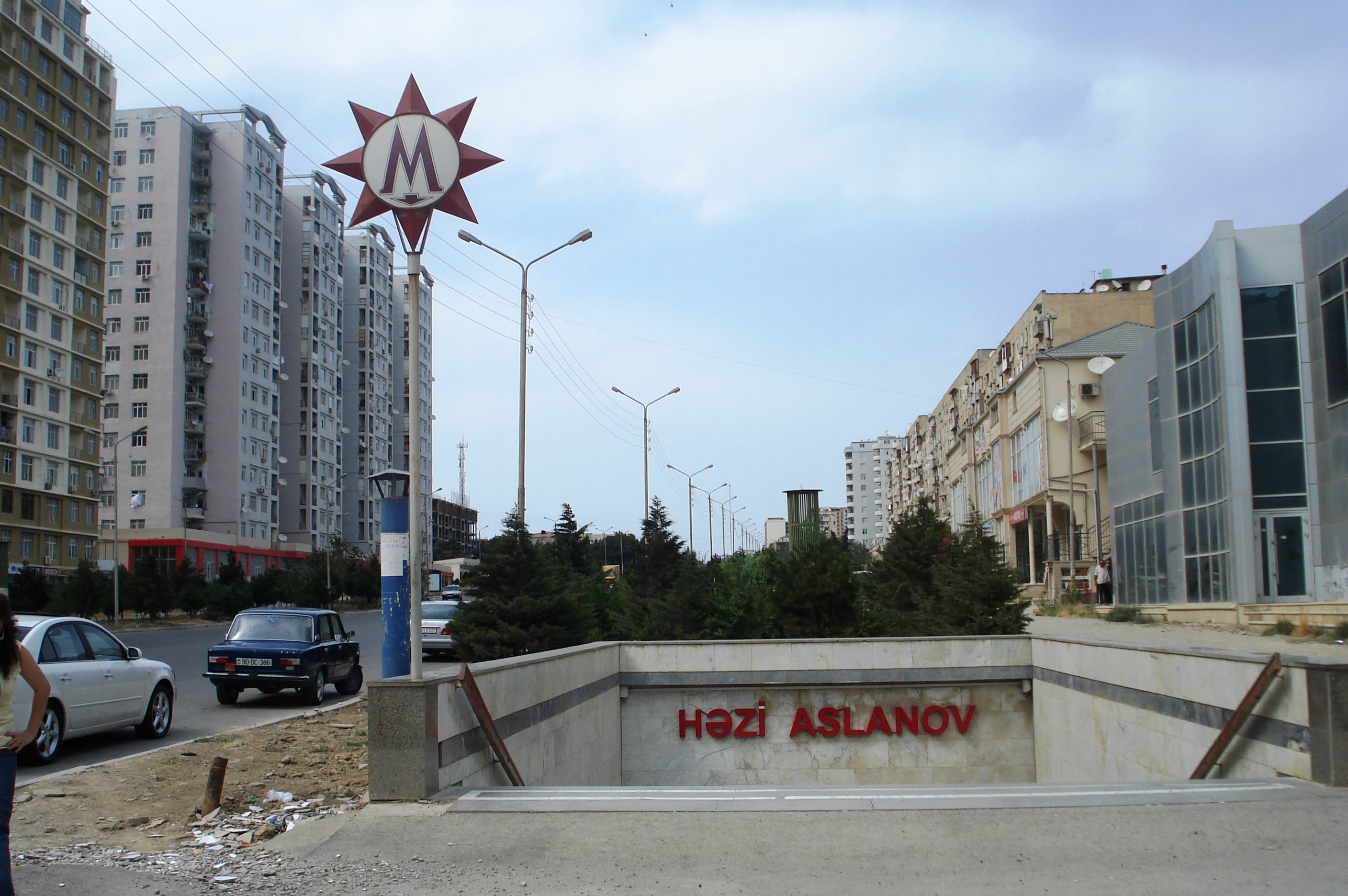 Наземный вестибюль станции "Ази Асланов" в Баку